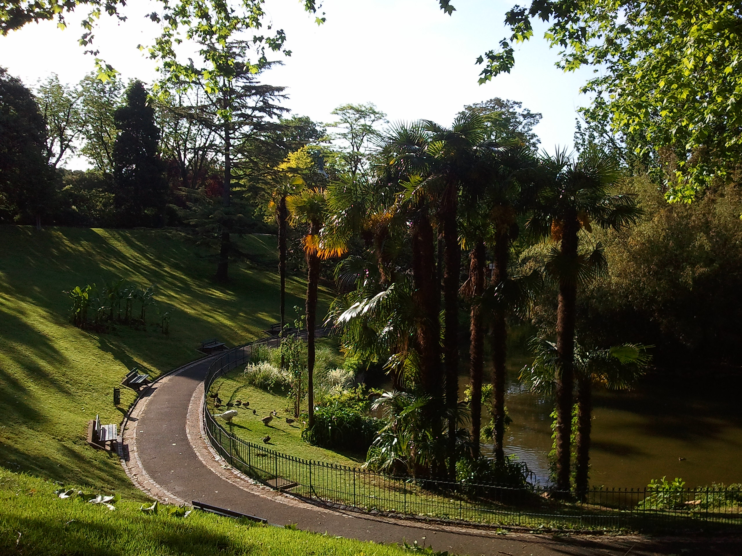 Plateau des Poètes - Jardin à l'anglaise de Béziers (Hérault), ville du Languedoc, FRANCE.